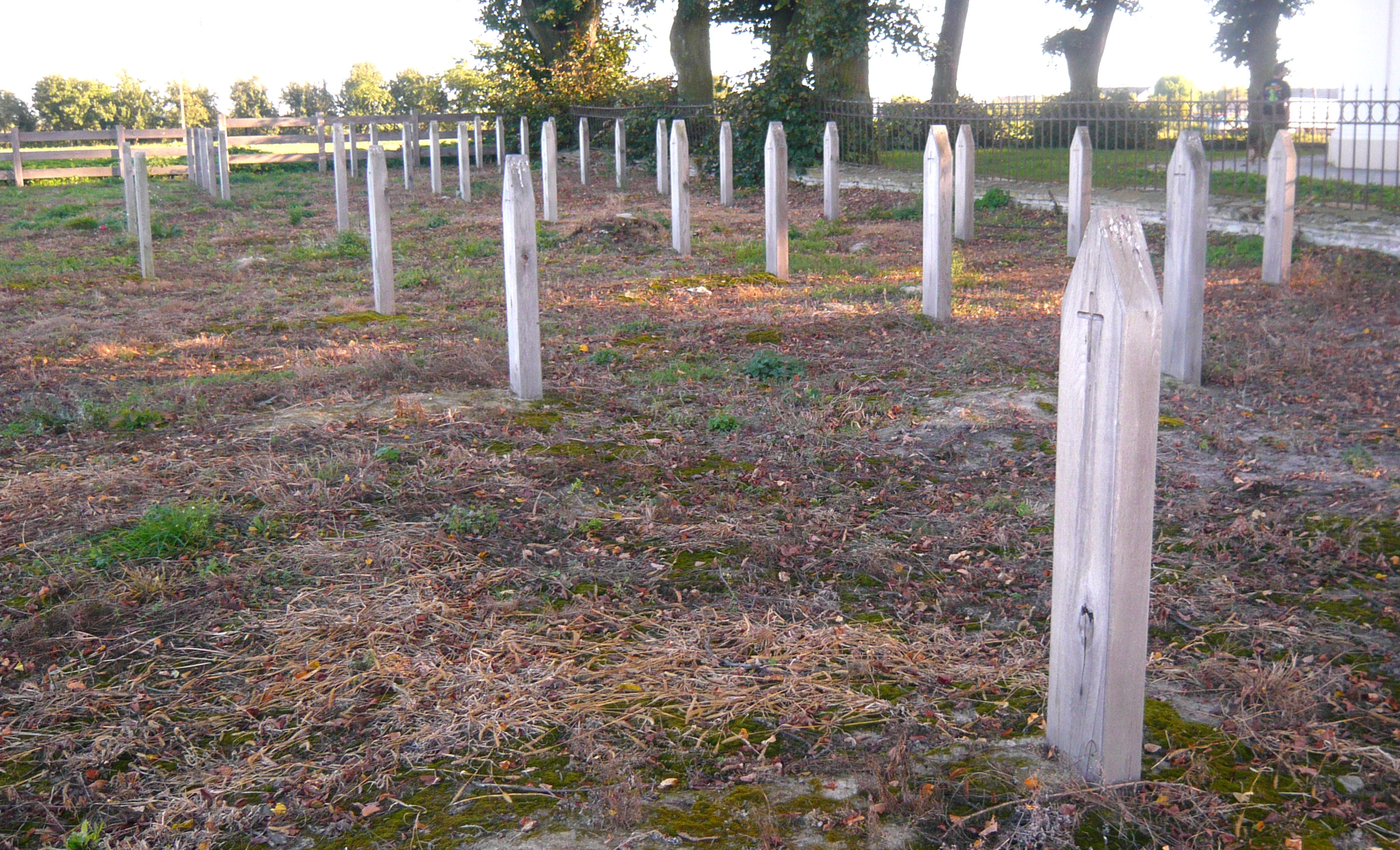 Cmentarz wojenny w Dratowie z 1915 roku